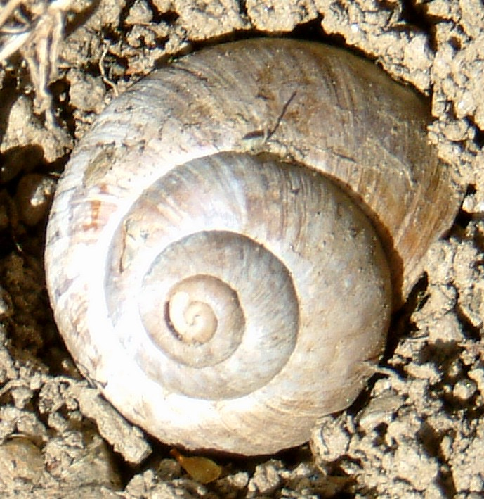 Helix pomatia